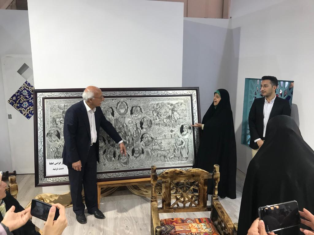 حضور خانم ابتکار معاونت محترم ریاست جمهوری در کنار اثر مشاهیر